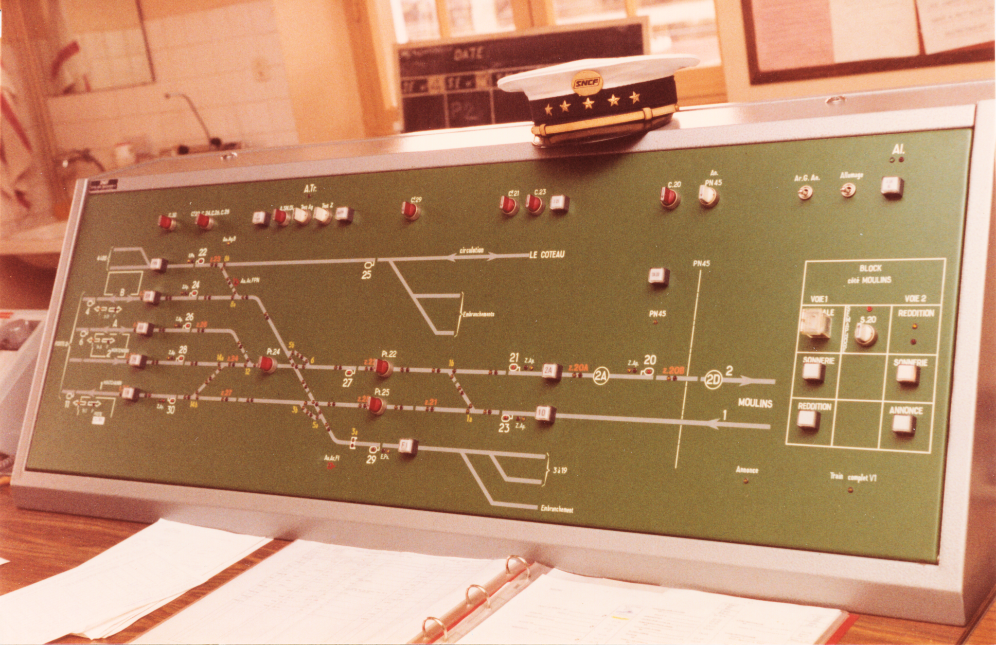 France - Ligne de Moulins à Lozanne Paray Le Monial - Poste 1 de type PRG